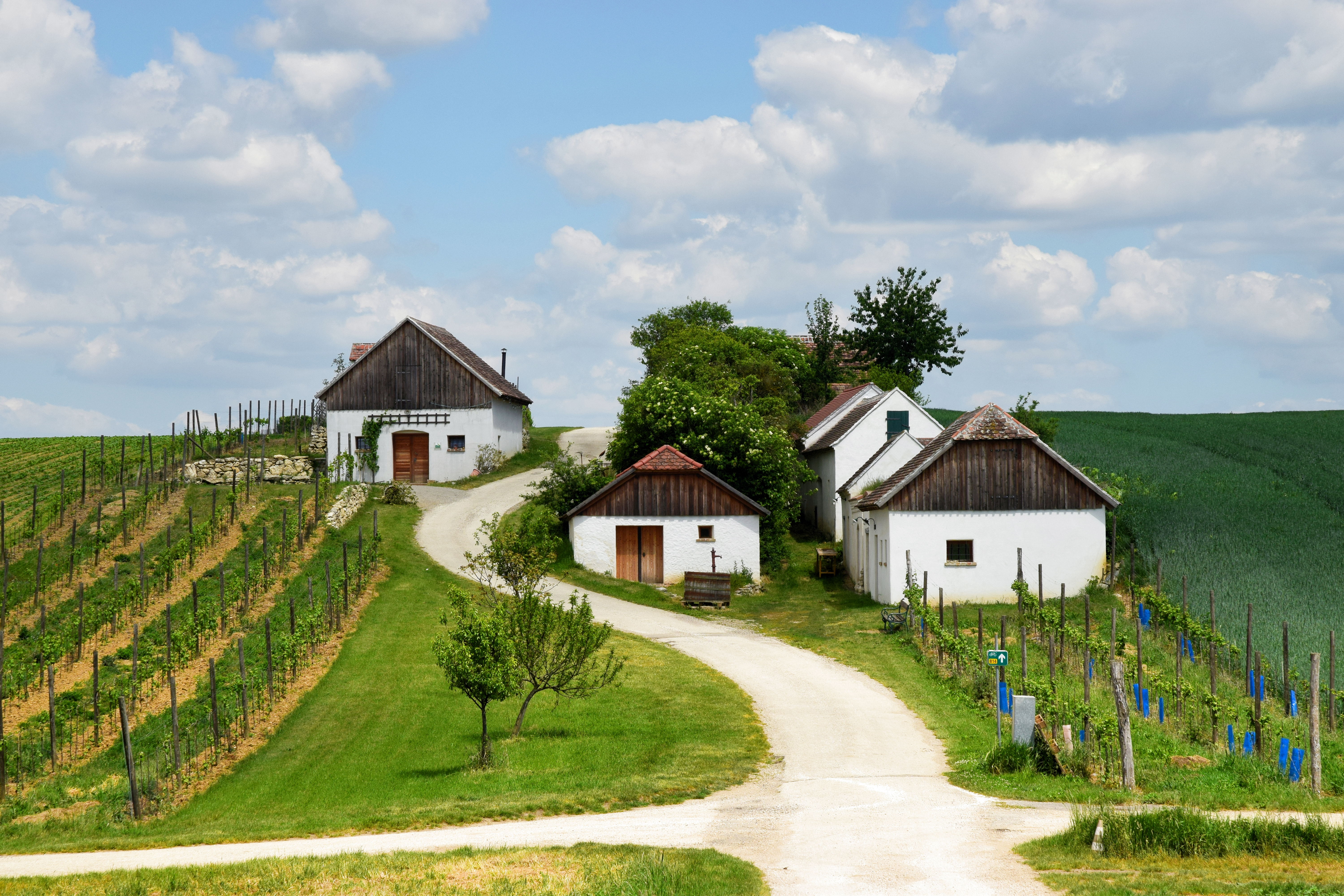 Kellergasse Steinfeld in Aschendorf, Gemeinde Wullersdorf / Niederösterreich